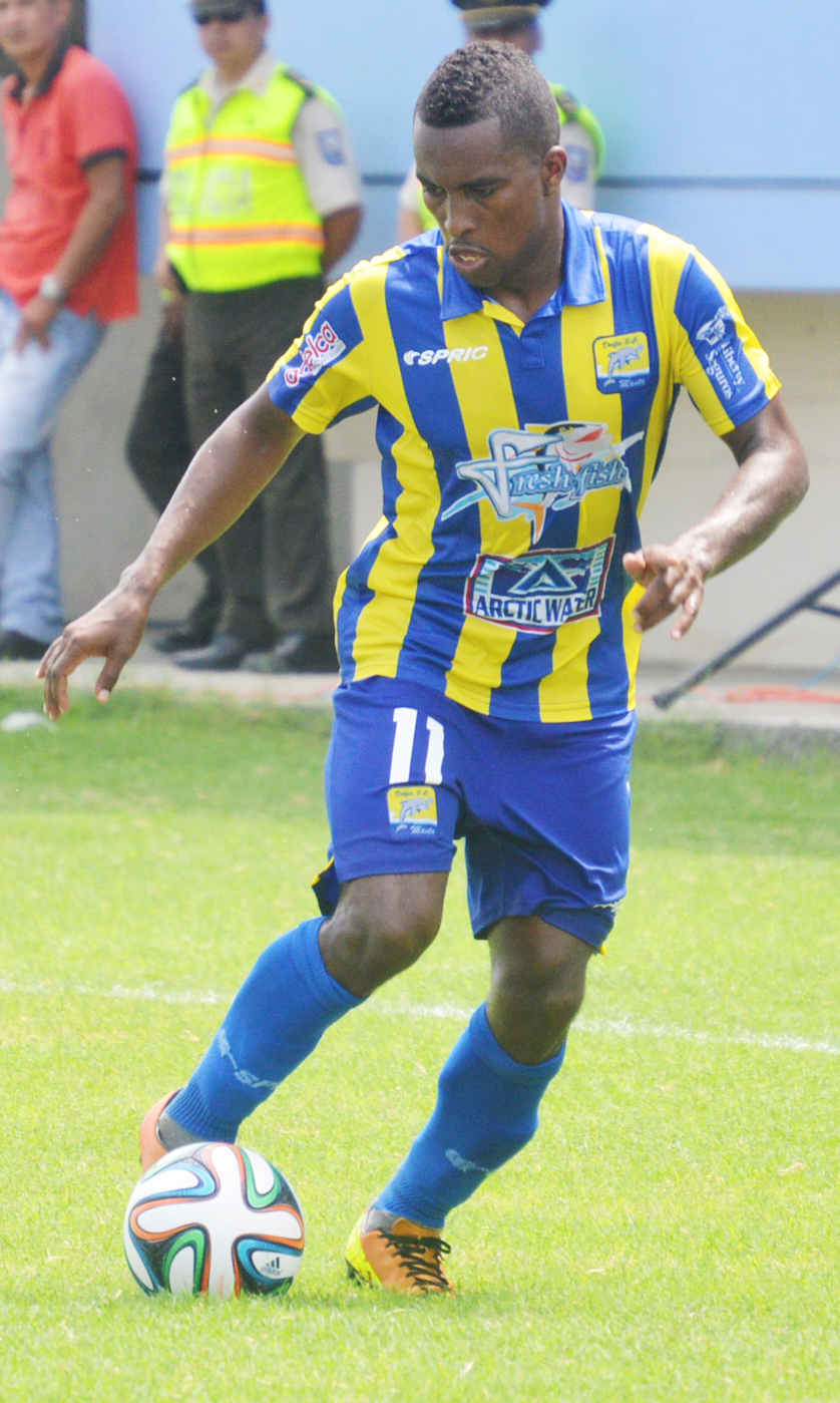 Juan Realpe en Delfín Sporting Club de Manta-2014